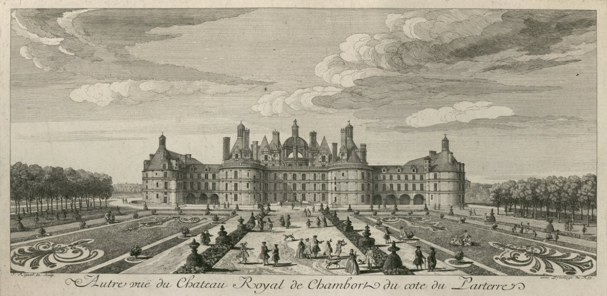 Estampe représentant les jardins à la française du château de Chambord (Loir-et-Cher, France) devant sa façade Nord.